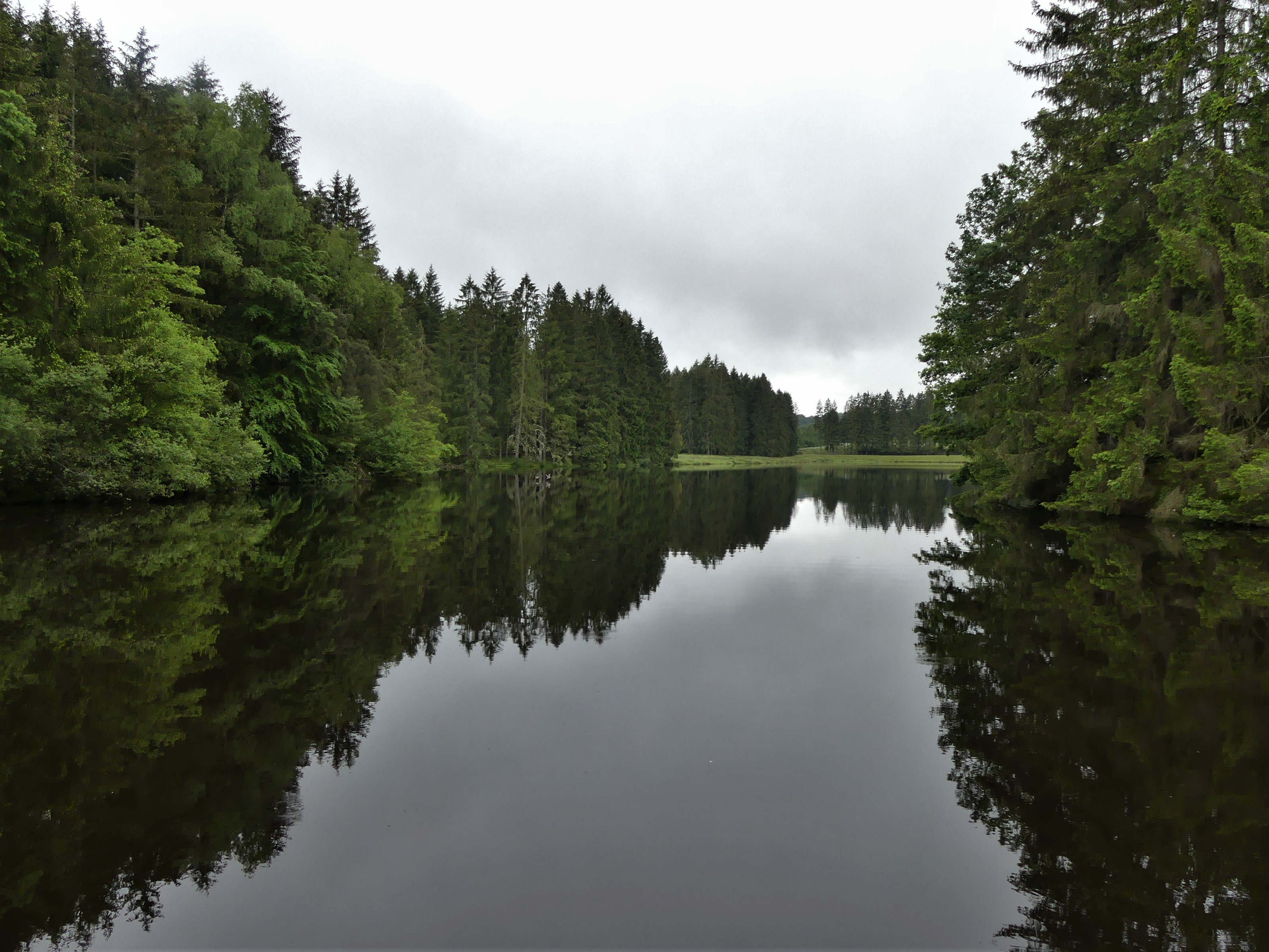 L'étang de la Chabassière alimenté par un affluent de la Banize, commune de Vallière, Creuse, France.